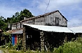 Casa y alpendre en Vilar de Arriba